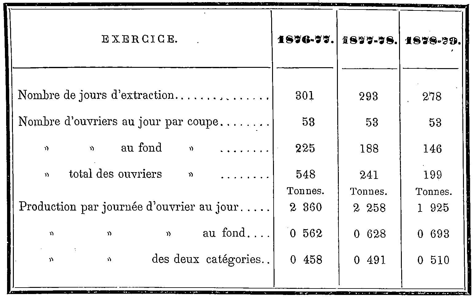 Productivité de trois exercices de la Compagnie des mines d'Ostricourt.